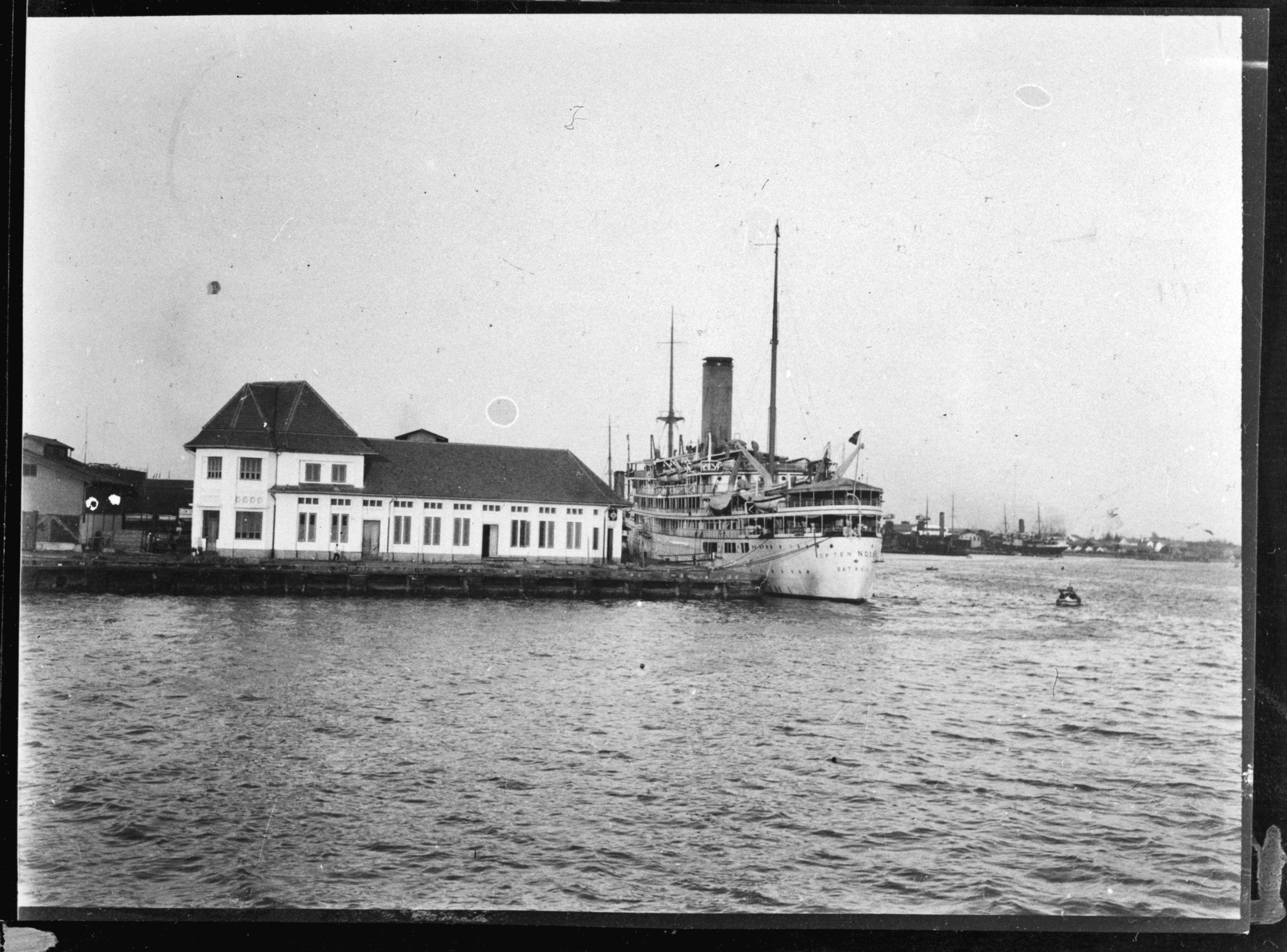 Collectie / Archief : Fotocollectie Anefo Reportage / Serie : MN [Merchant Navy] / Anefo Londen serie Beschrijving : Het passagiersschip s.s. "Op ten Noort" van de Koninklijke Paketvaart Mij. (KPM) in de haven van Soerabaja Annotatie : Repronegatief. In 1941 omgebouwd tot hospitaalschip, in 1942 door de Japanners buitgemaakt en omgedoopt tot hospitaalschip Tenno Maru, 1944 hernoemd Hikawa Maru, door de Japanners na de capitulatie tot zinken gebracht. Datum : ongedateerd Locatie : Indonesië, Nederlands-Indië, Surabaya Trefwoorden : koopvaardijvloten, marine, passagiersschepen, tweede wereldoorlog Fotograaf : Onbekend / Publiek Domein Auteursrechthebbende : Nationaal Archief Materiaalsoort : Negatief (zwart/wit) Nummer archiefinventaris : bekijk toegang 2.24.01.04 Bestanddeelnummer : 935-3116